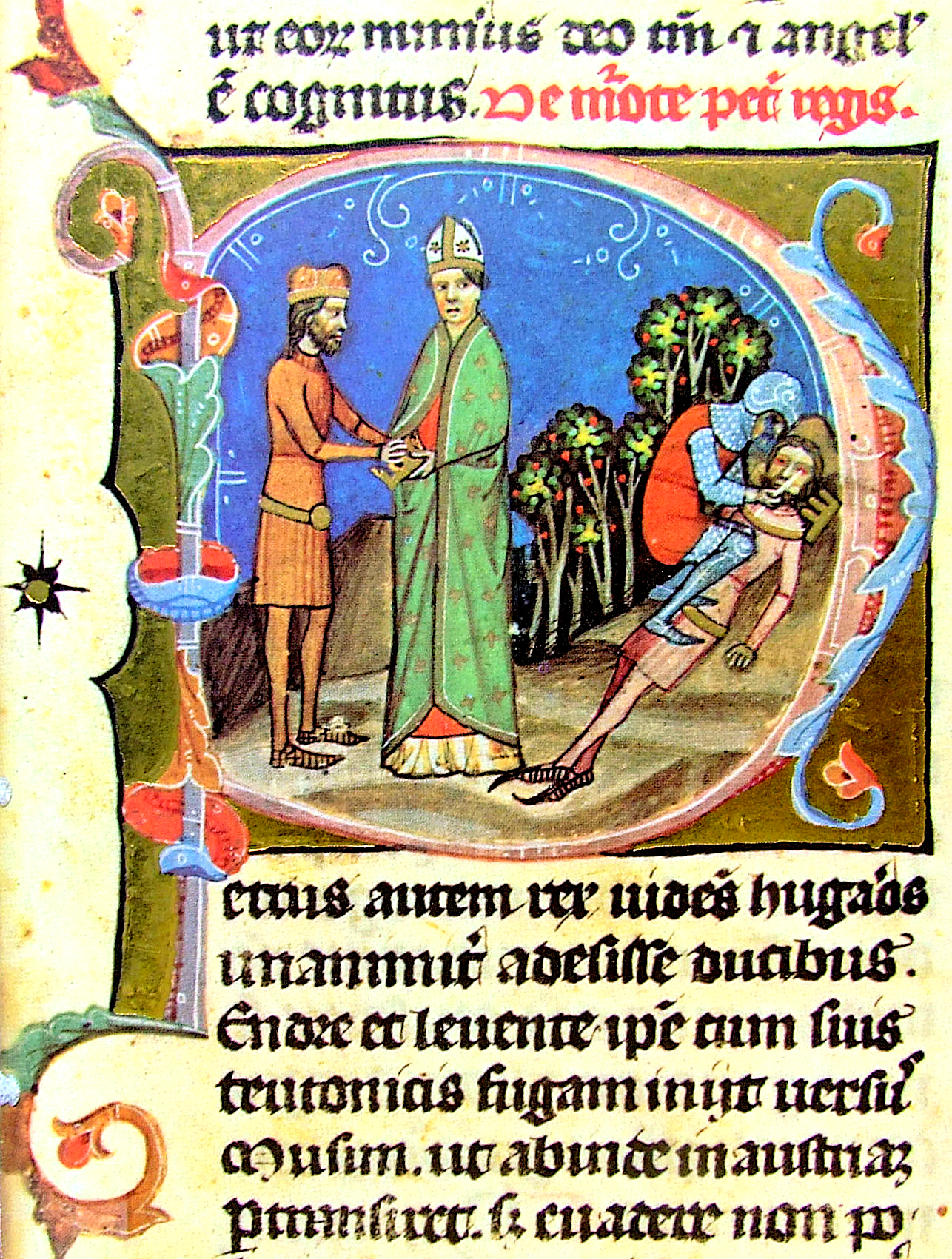 Miniatúra a Képes Krónikából»P« iniciáléban: Péter király megvakítása. András herceg átveszi a koronát. Fás vidéken egy katona teljes fegyverzetben a földön fekvő Péter király testén térdel és kiszúrja a szemét. Péter feje mellett a leesett korona. Baloldalt egy püspök, nyilván a szövegben szereplő Beneta áll, és András herceg felé nyújtja a koronát. Utóbbi jelenet a szöveg következő fejezetére vonatkozik.